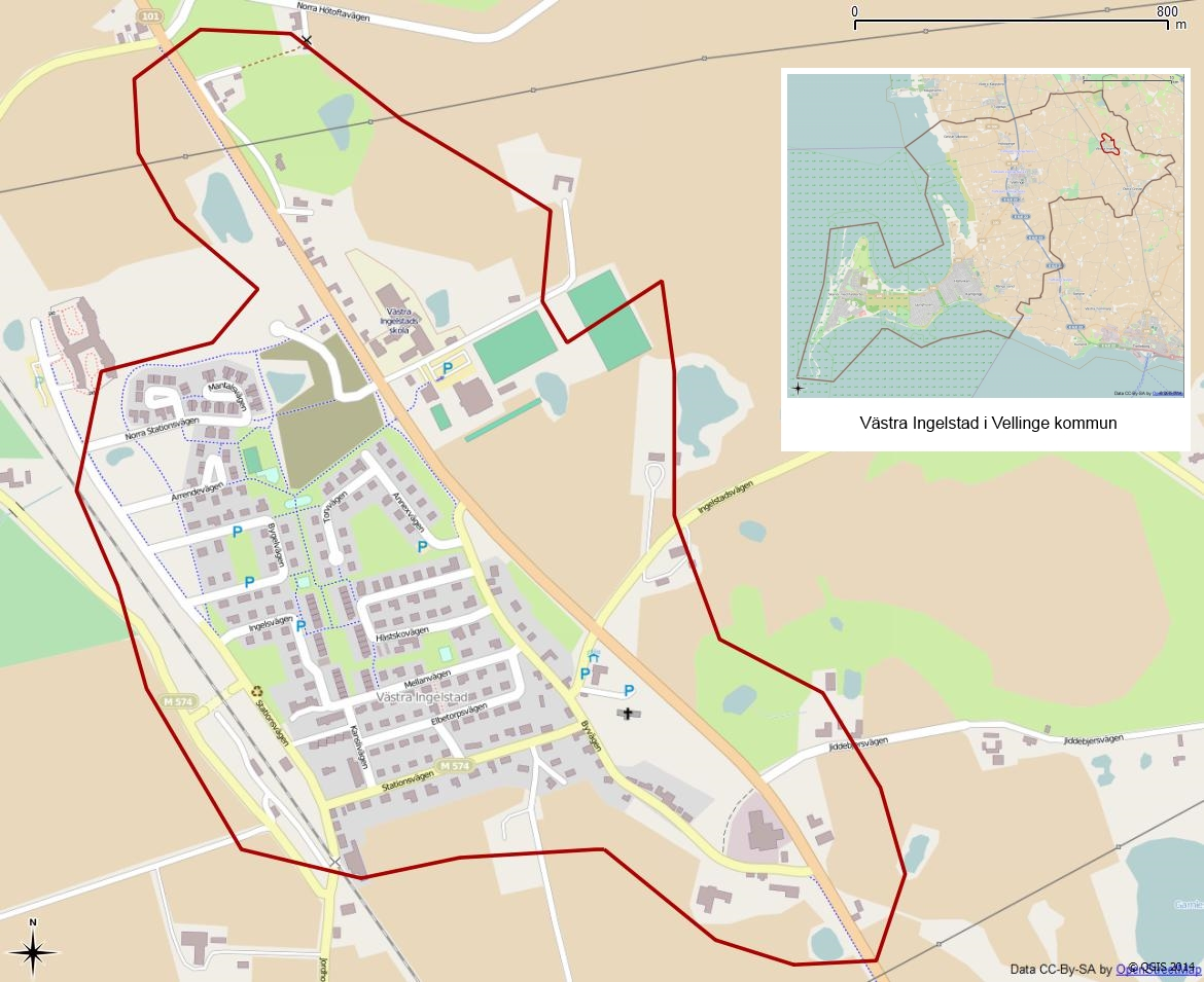 Tätorten Västra Ingelstads gränser 1990 enligt Atlas över rikets indelningar 1992.